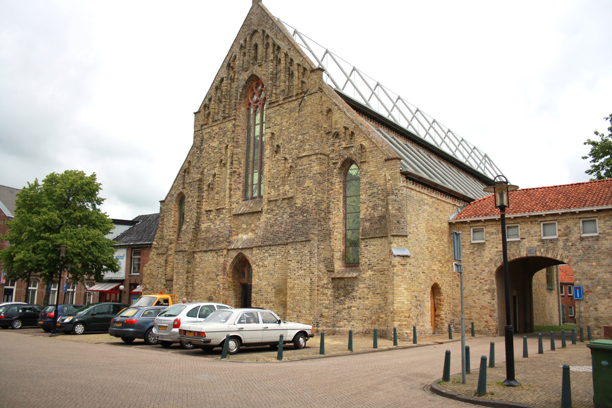 Voorzijde Broerekerk